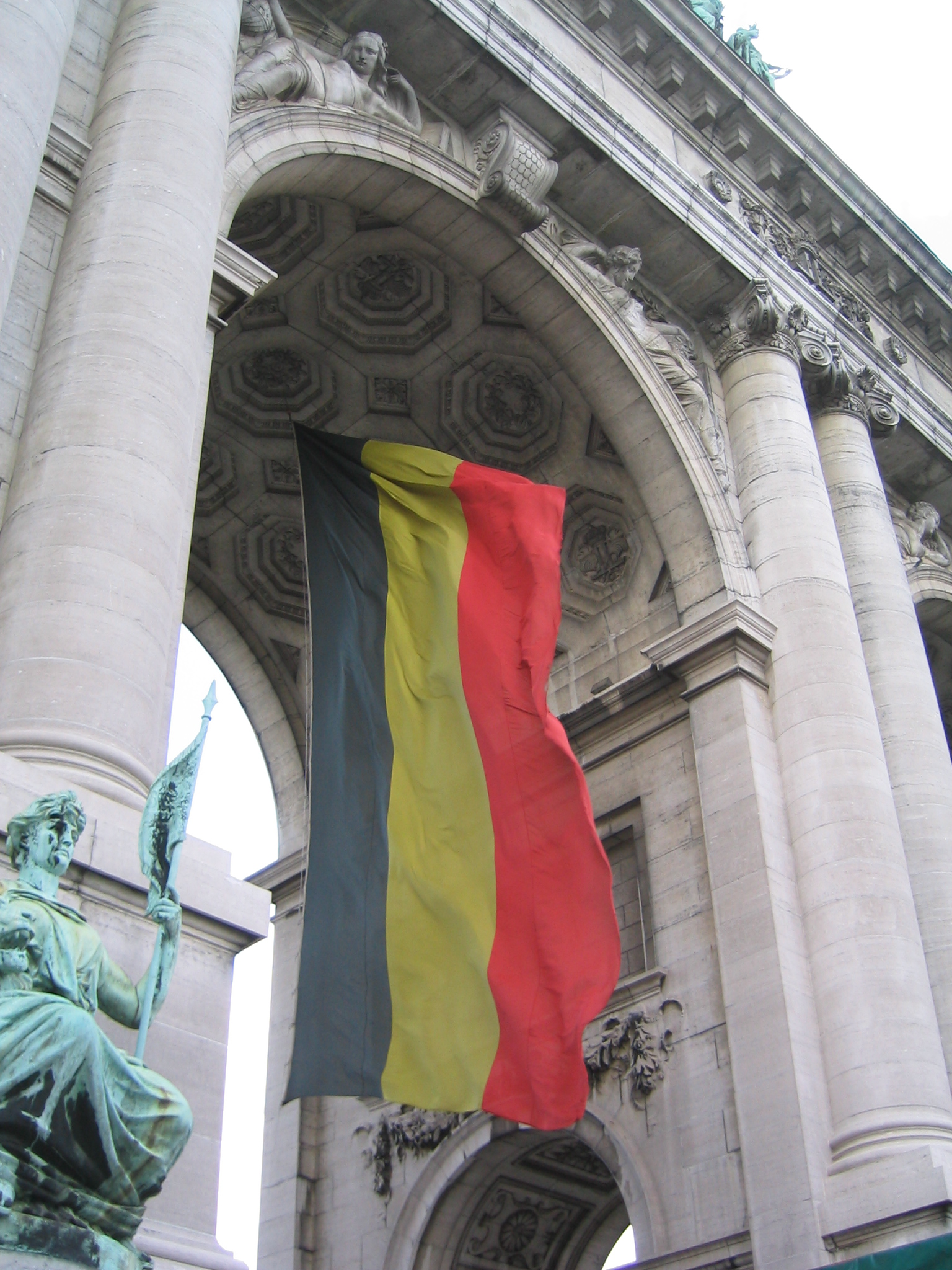 Belgian flag in Brussels' Jubelpark